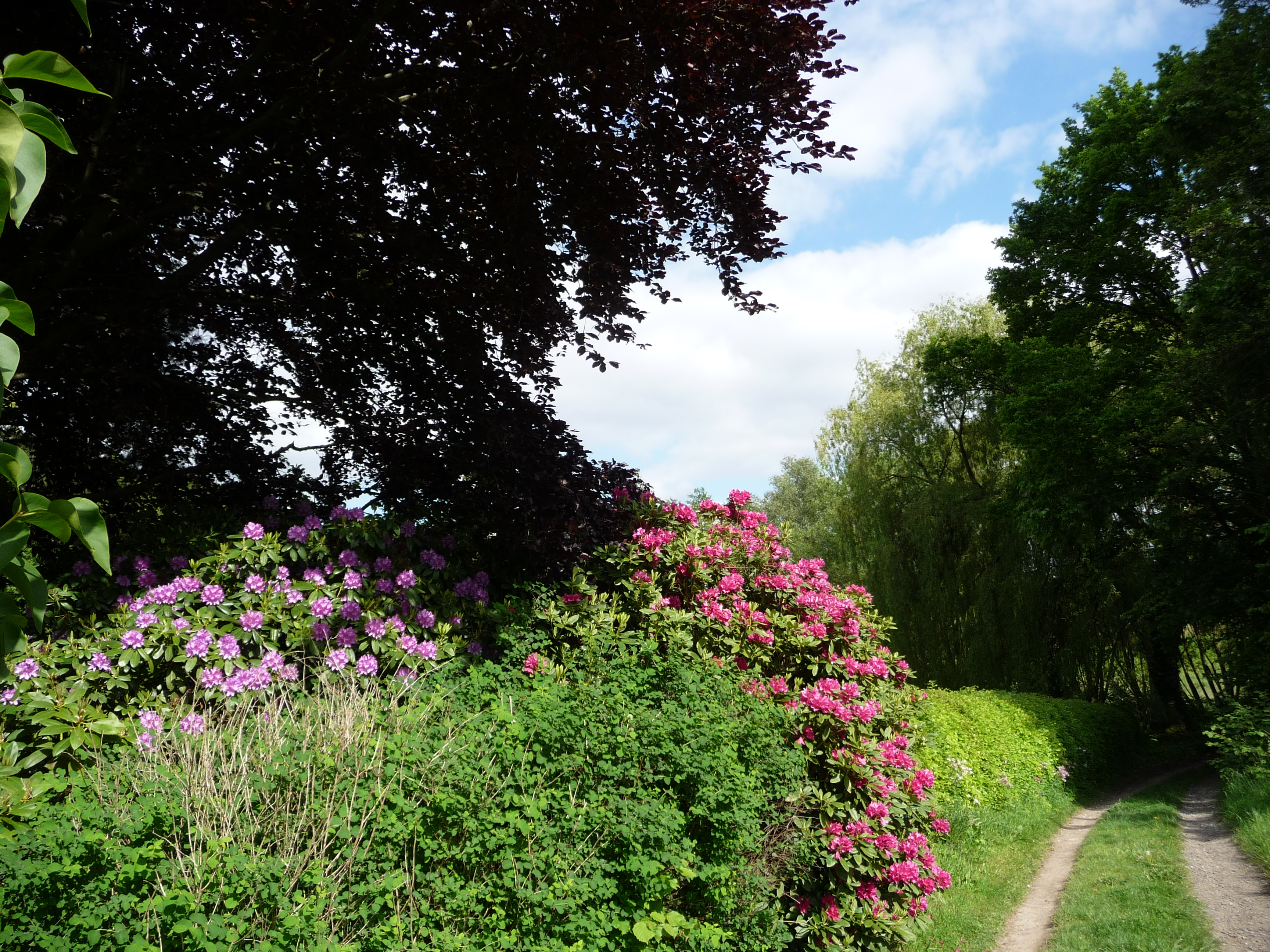 Ein herrliches, sich in Weite erstreckendes Landschaftsschutzgebiet im Umkreis von Melle.